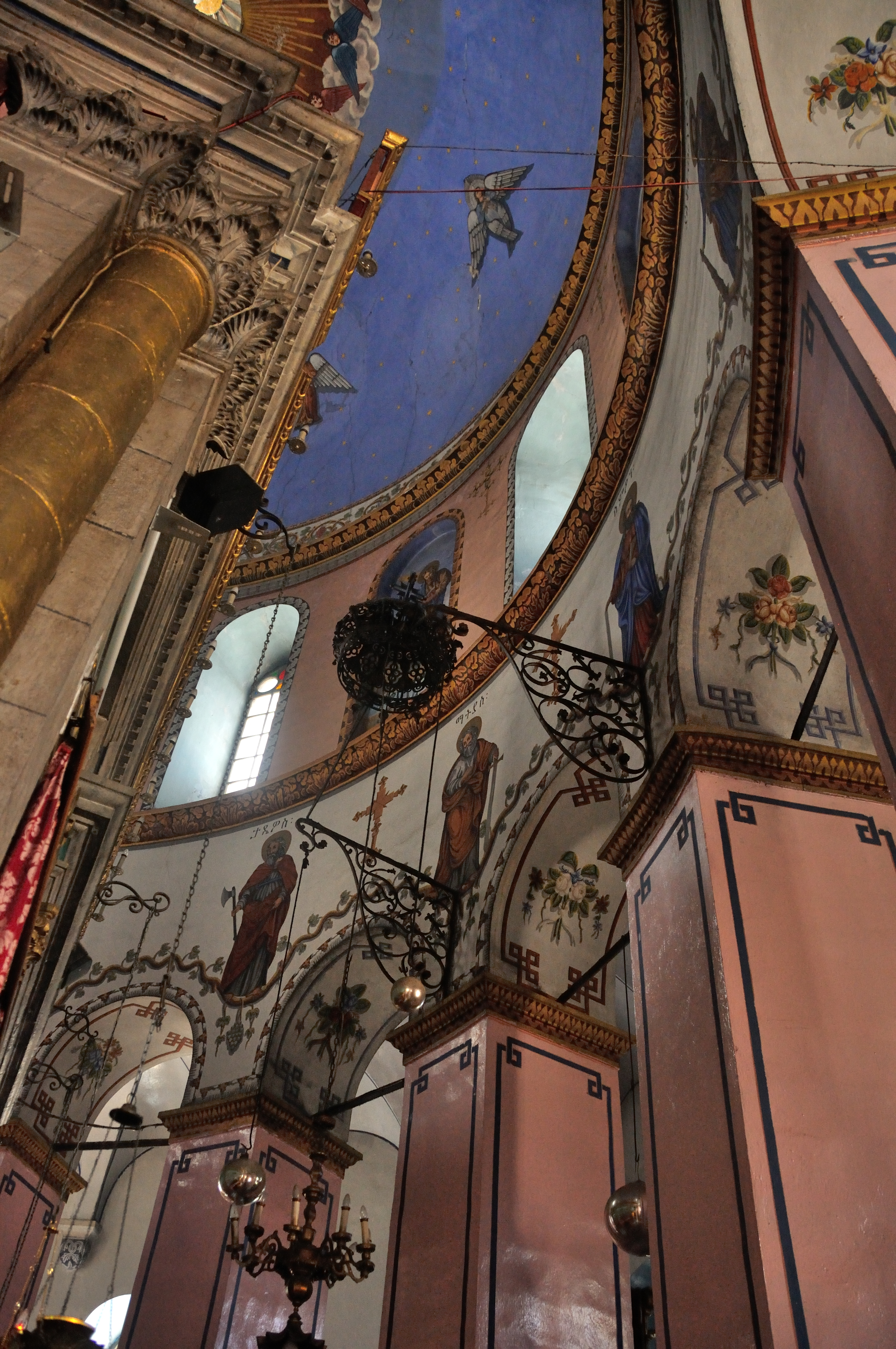 הכנסייה האתיופית או כנסיית קִידאנה מִהְרַת (ברית הרחמים) היא כנסייה שנבנתה ברחוב אתיופיה 10 בירושלים, במימון יוהנס הרביעי, קיסר אתיופיה. צורתה עגולה, הגג מכוסה בכיפה שחורה ועליה צלב אתיופי במרכזה. מעל לכניסות לגברים ולנשים מוצב תבליט של אריה וכתובת בשפות שונות.